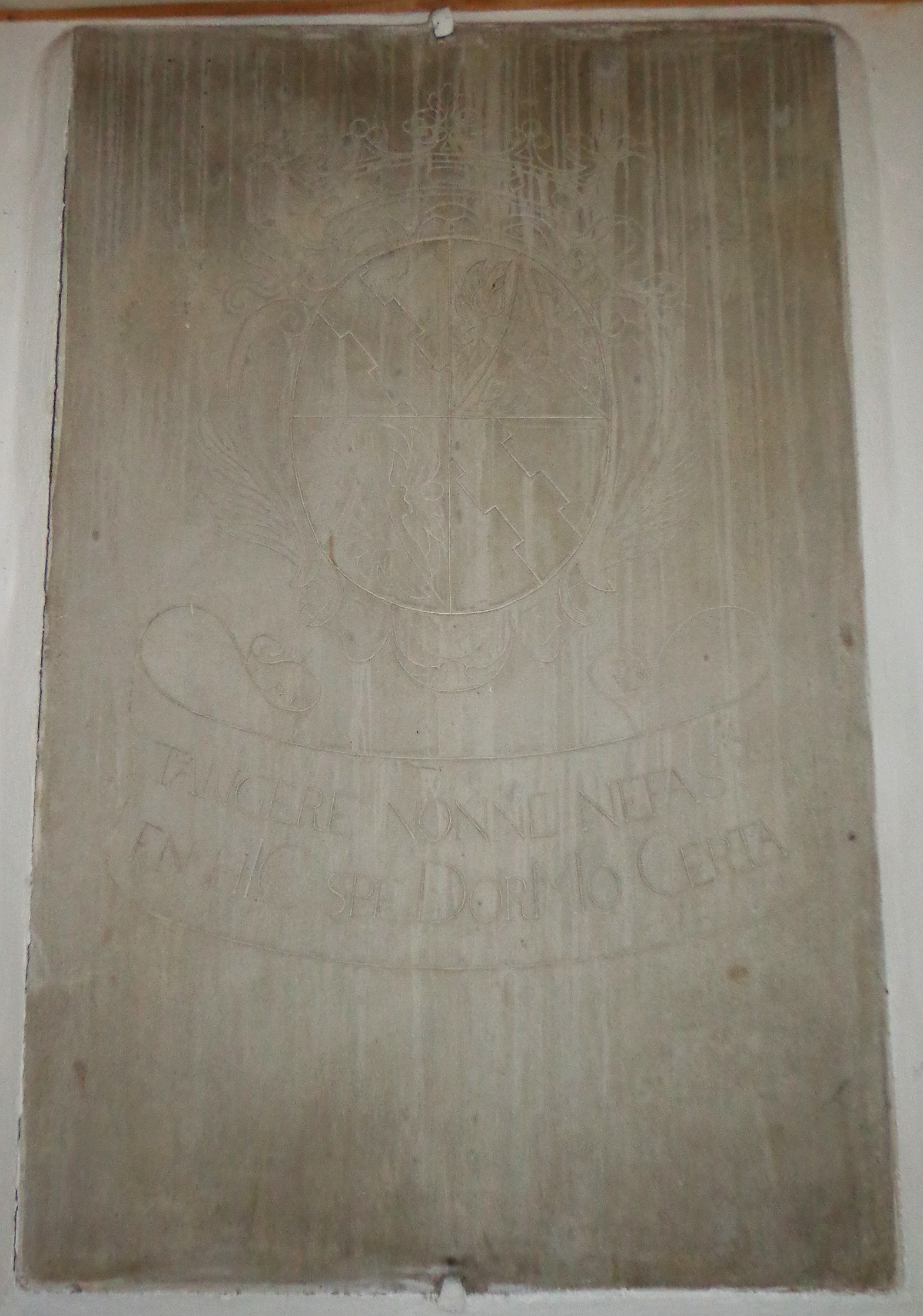 ehemalige Deckplatte der Gruft der Grafen von Ortenburg in der Marktkirche Ortenburg: Die Platte aus weißem Marmor befindet sich nun an der östlichen Chorabschlusswand. Die Inschrift ist in lateinischer Sprache verfasst und lautet übersetzt: „Ist Berührung nicht Unrecht? Siehe, hier schlafe ich in sicherer Hoffnung.“ Weitere Buchstaben auf der Platte bilden ein Chronogramm und stellen das Jahr 1702 dar, das Todesjahr des Grafen Georg Philipp.